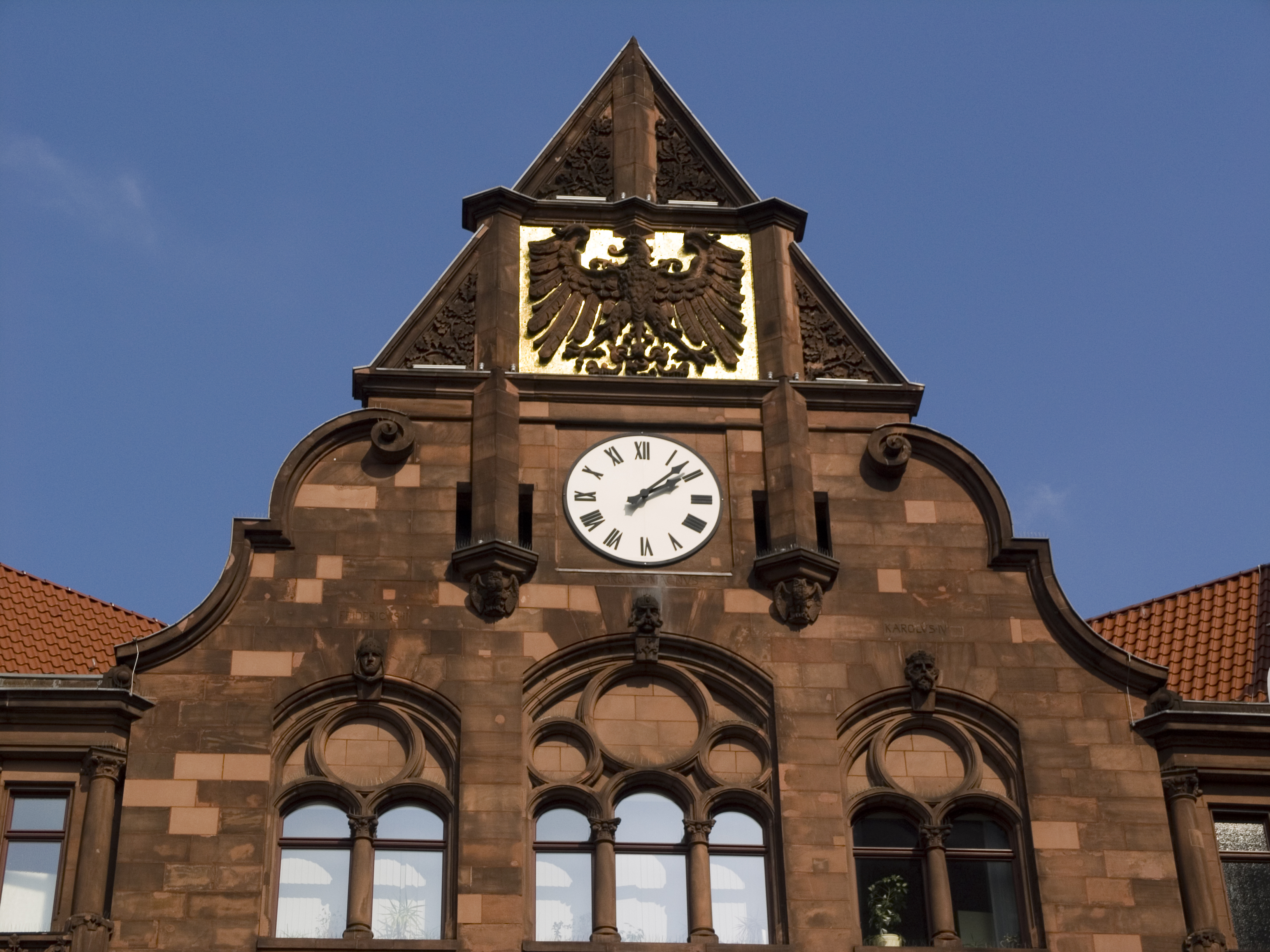 Северный Рейн - Вестфалия, Дортмунд - Старая ратуша